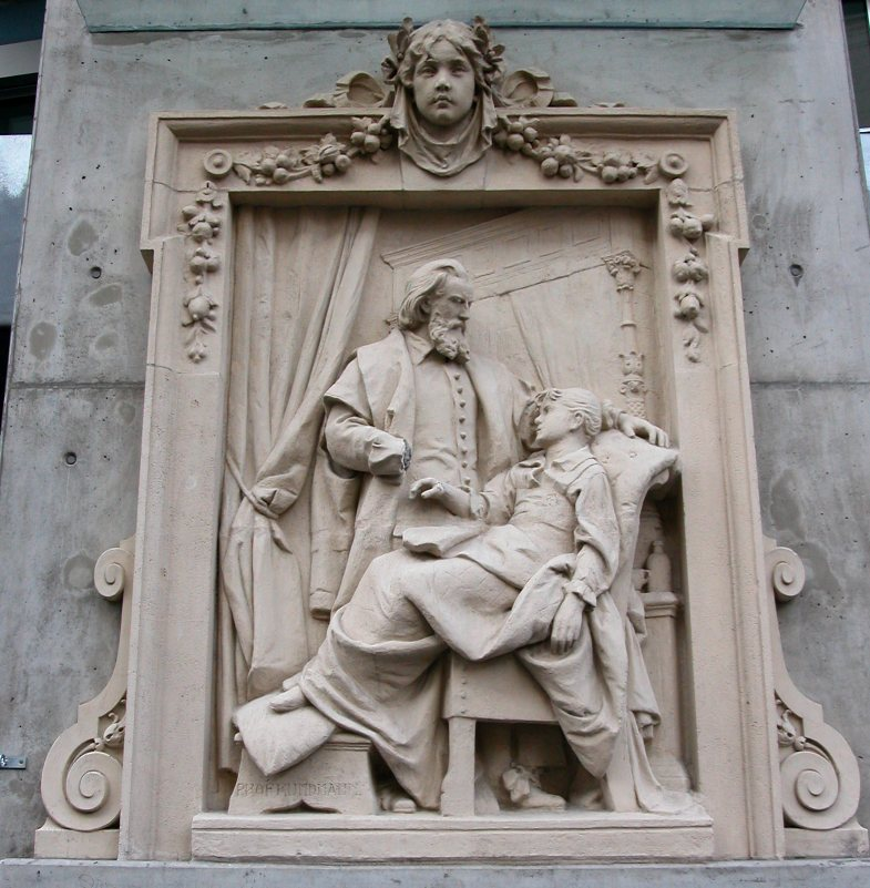 Relief, das sich über dem Eingang Baumgasse des ehemaligen Mautner Markhof´schen Kinderspitals befand.